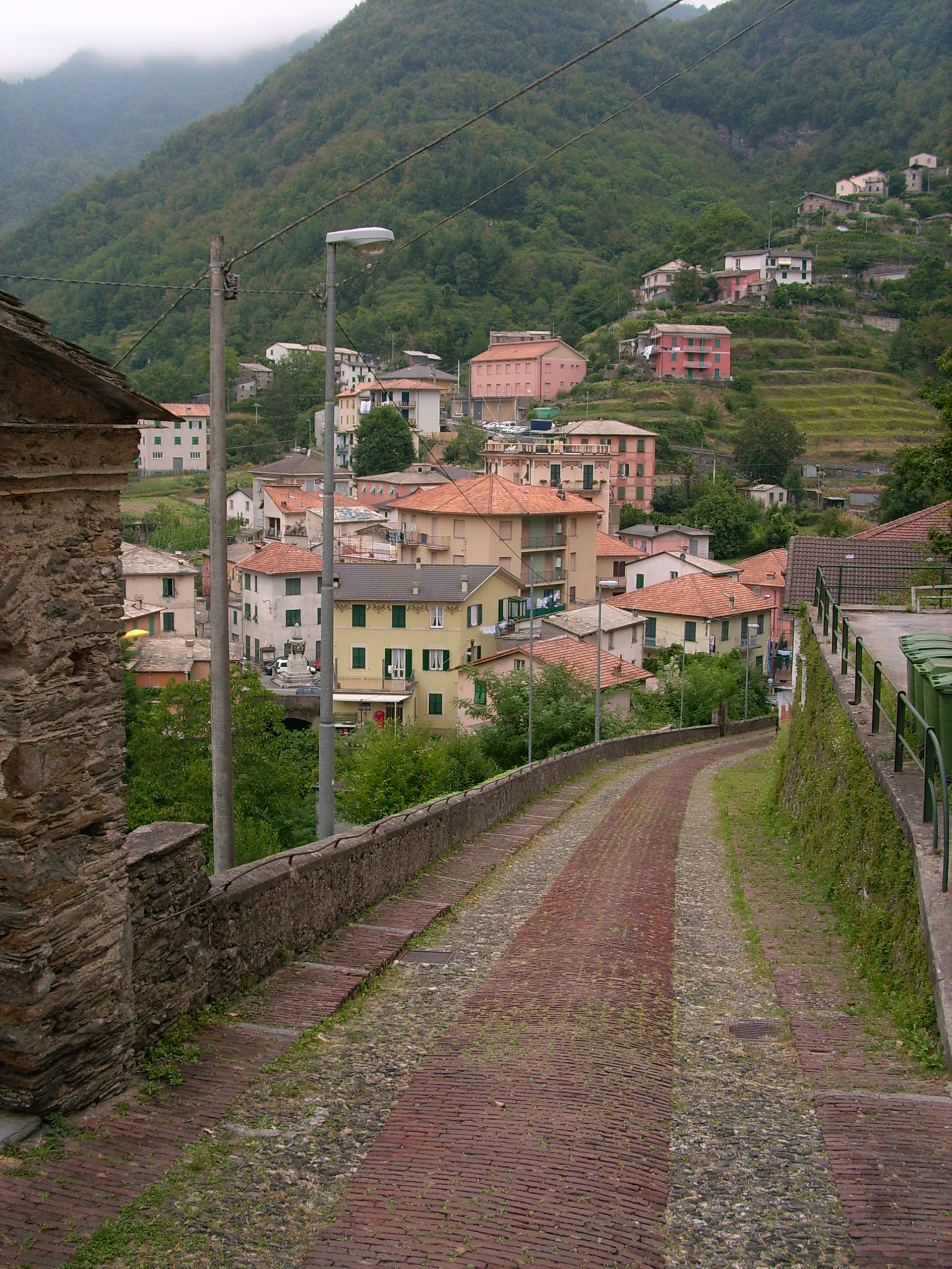 Strada che conduce al santuario Nostra Signora del Rosario presso Favale di Malvaro, Liguria, Italia